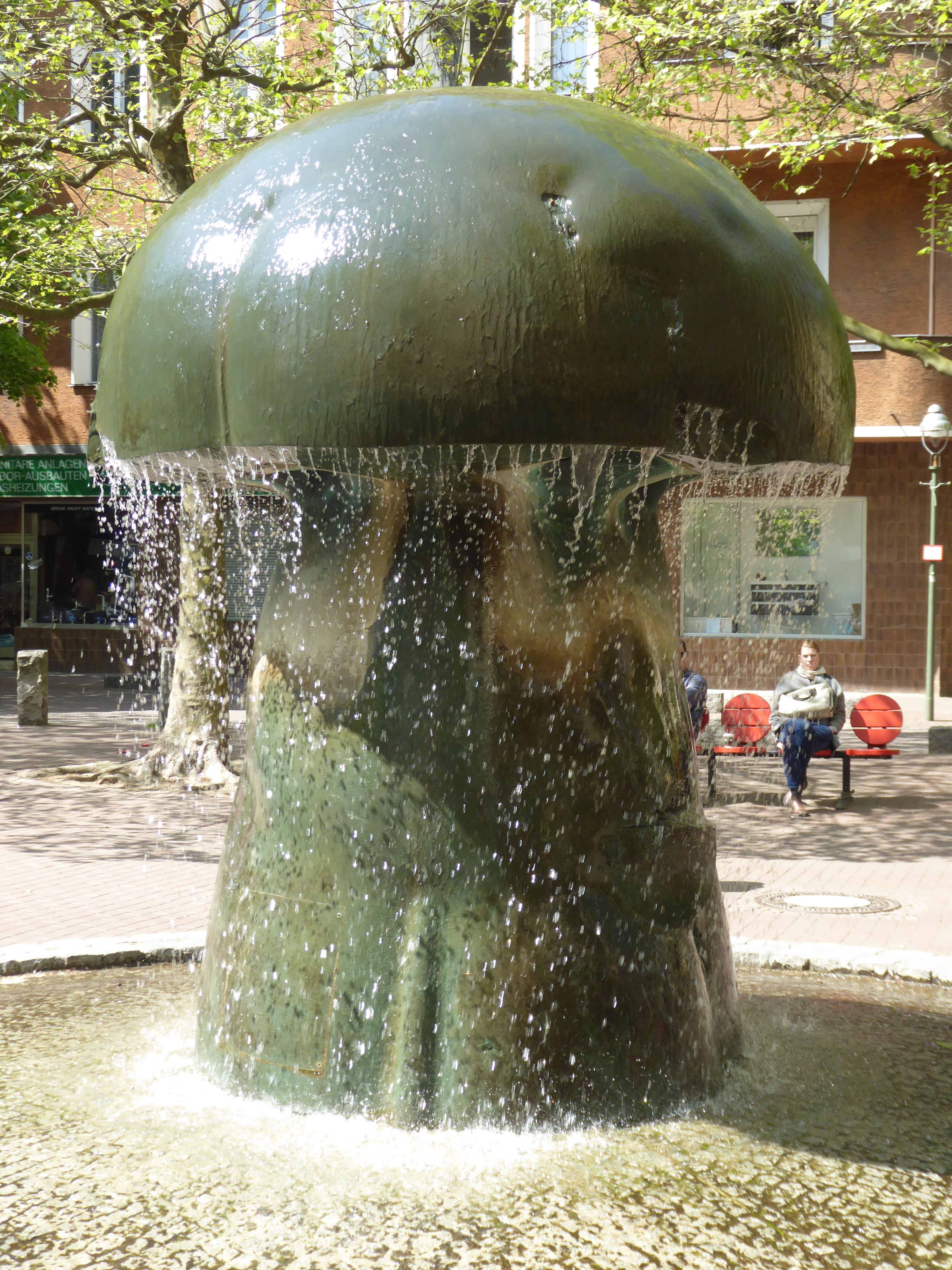 Wilmersdorf Leon-Jessel-Platz Wasserpilz